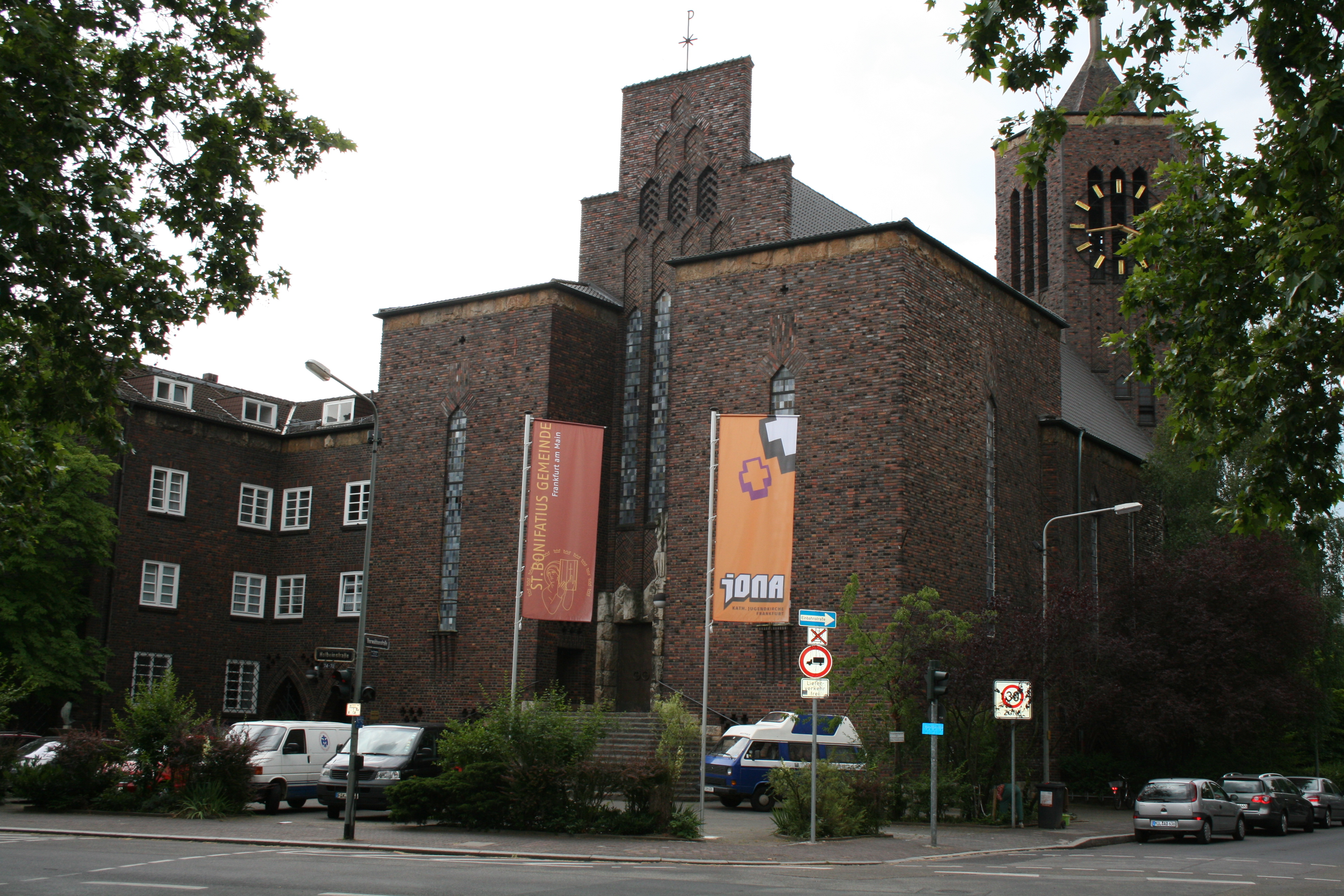 Pfarrkirche St. Bonifatius, Frankfurt-Sachsenhausen / JONA - Kath. Jugendkirche Frankfurt